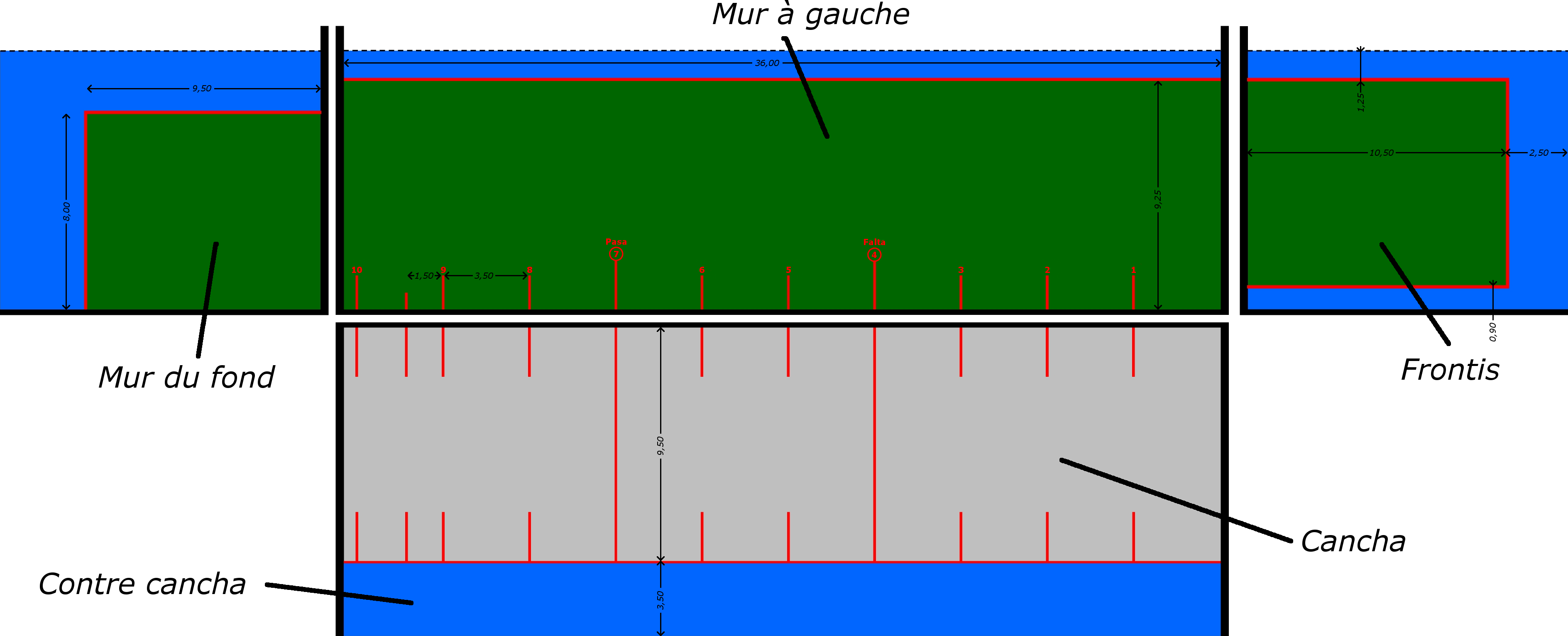 Plans FFPB